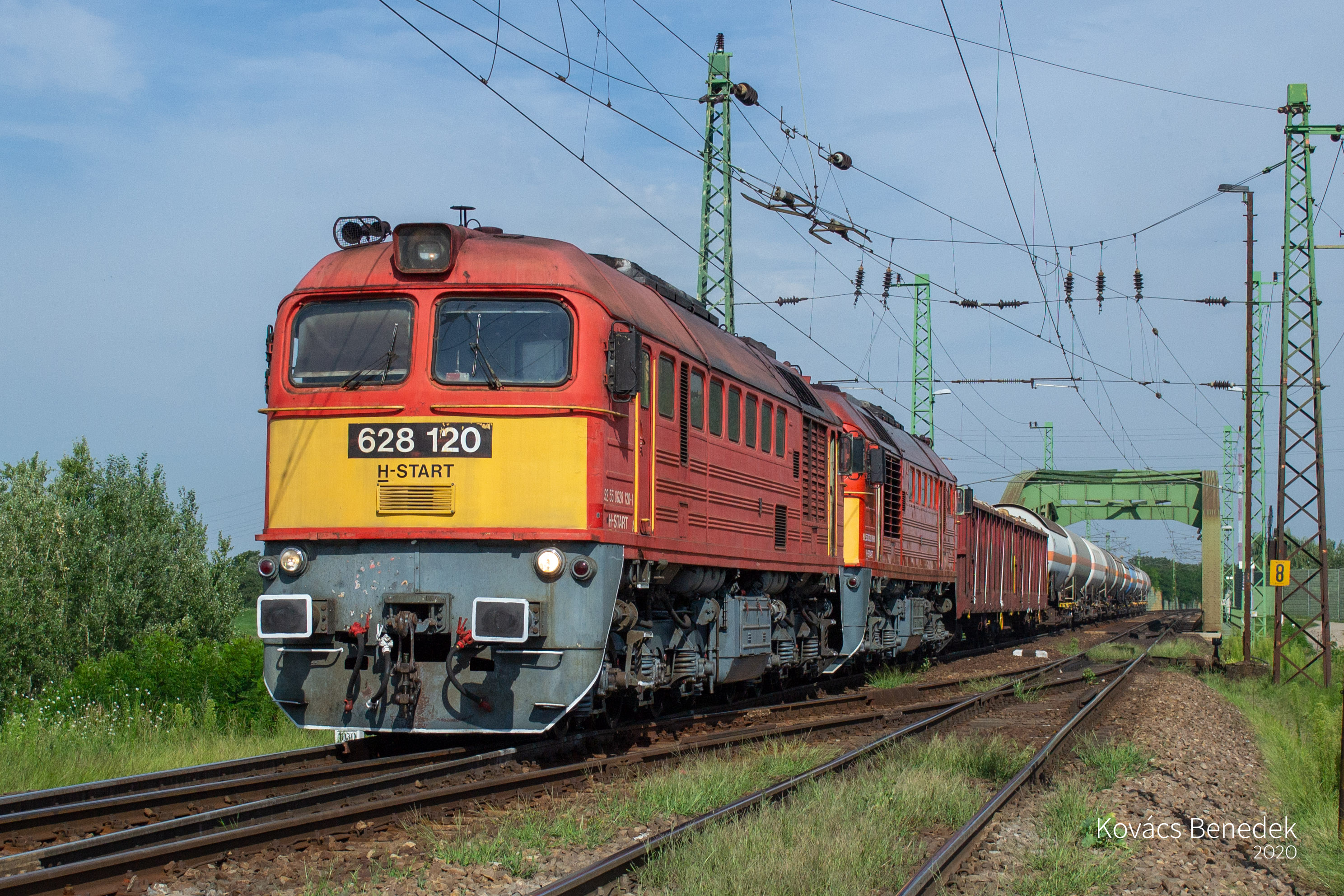 628 120, és a fekve maradt 628 089 Szolnok előtt